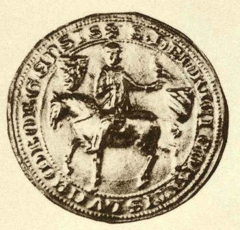 This is a scan of the historical document: Title: Die Siegel der deutschen Kaiser und Könige v. 1 (751 - 1347)